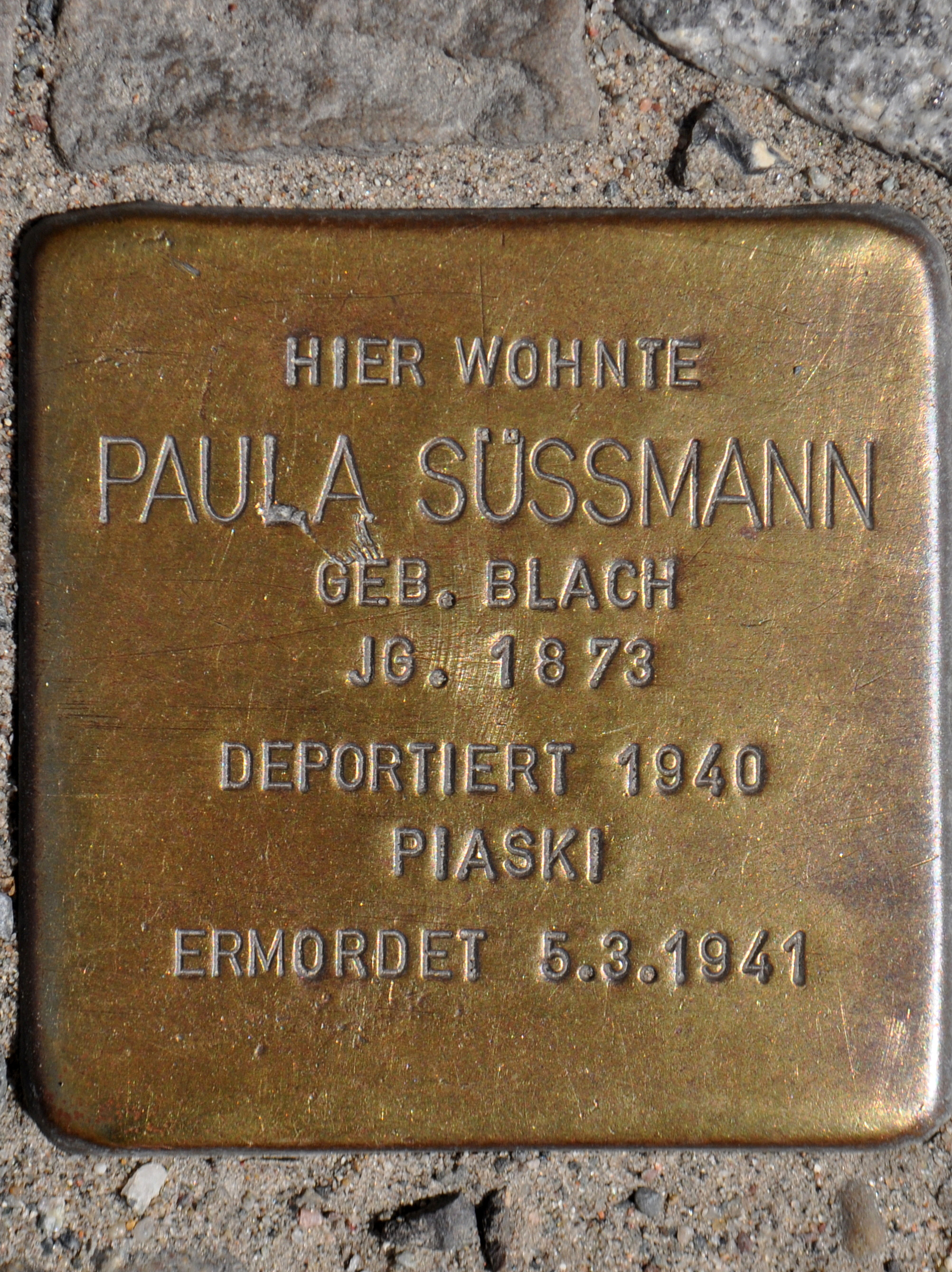 Stolperstein in Stralsund, Ossenreyerstraße HIER WOHNTE PAULA SÜSSMANN GEB. BLACH JG. 1873 DEPORTIERT 1940 PIASKI ERMORDET 5.3.1941